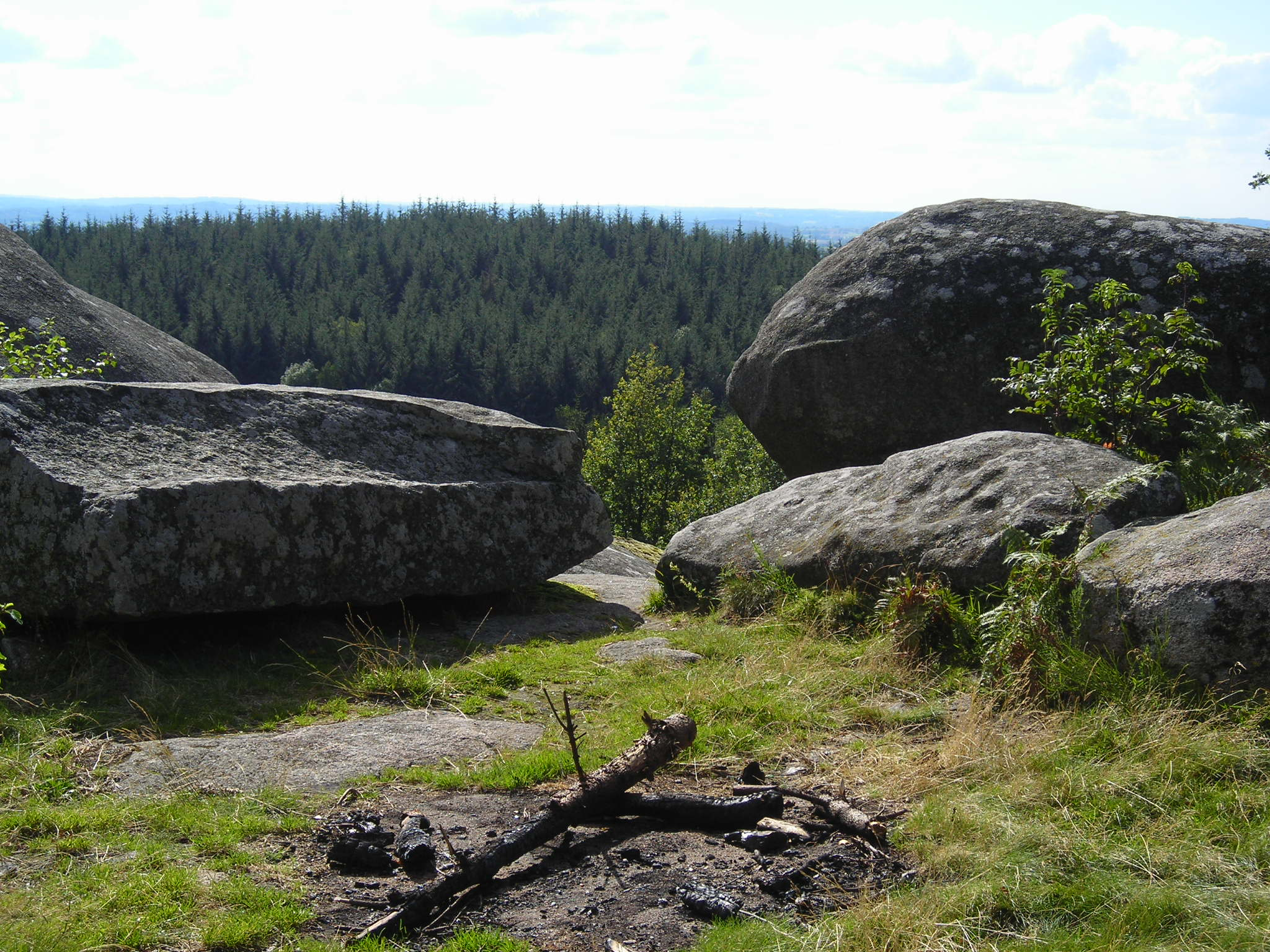 gueret pierres civieres 7588